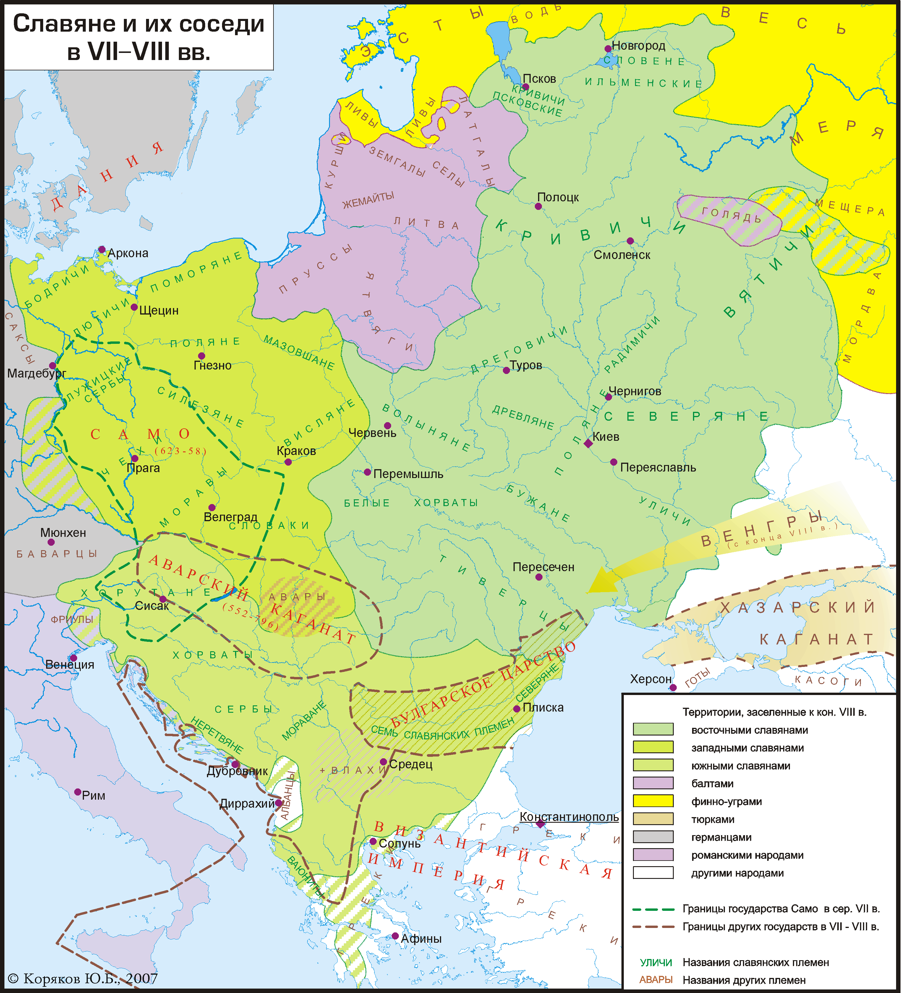 Карта расселения славян и их соседей на конец VIII века. Границы некоторых государств показаны начиная с VII в. Основана в восточнославянской части в основном на археологических картах и описаниях, в частности взятых из работ В.В.Седова (в основном данные по славянам) и тома "Финно-угры и балты в эпоху средневековья" (1987) из серии Археология СССР (в основном данные по балтам и финно-уграм).